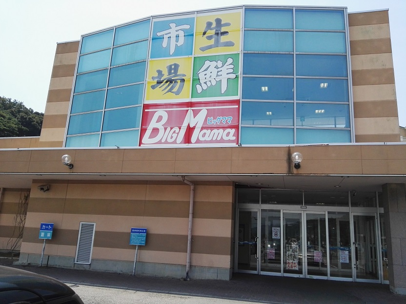 Bigmama, a grocery store at Nishio